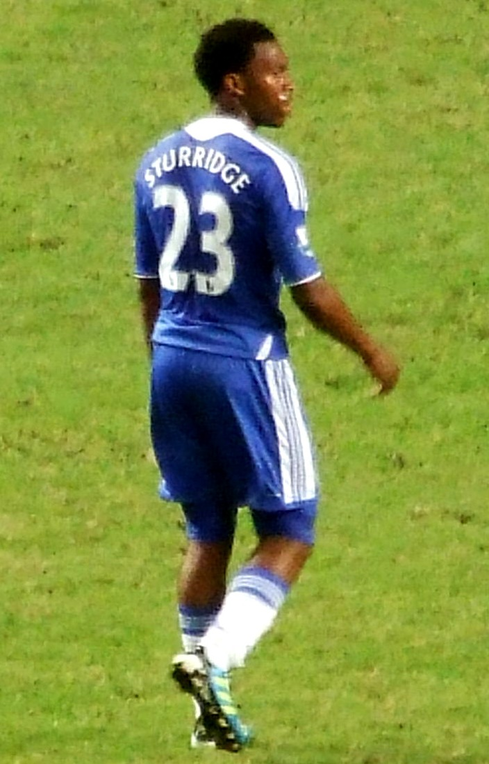 Дэниел Старридж в финале Barclays Asia Trophy 2011